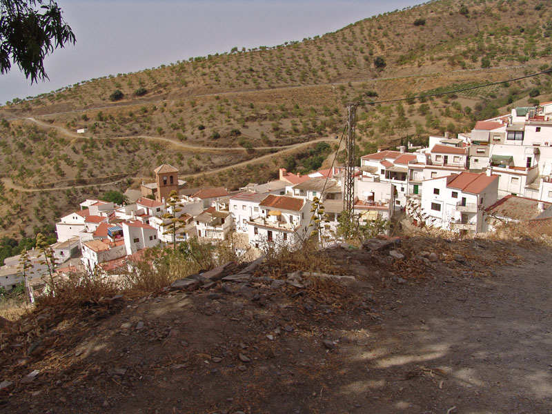 Sorvilán, en Granada (España)